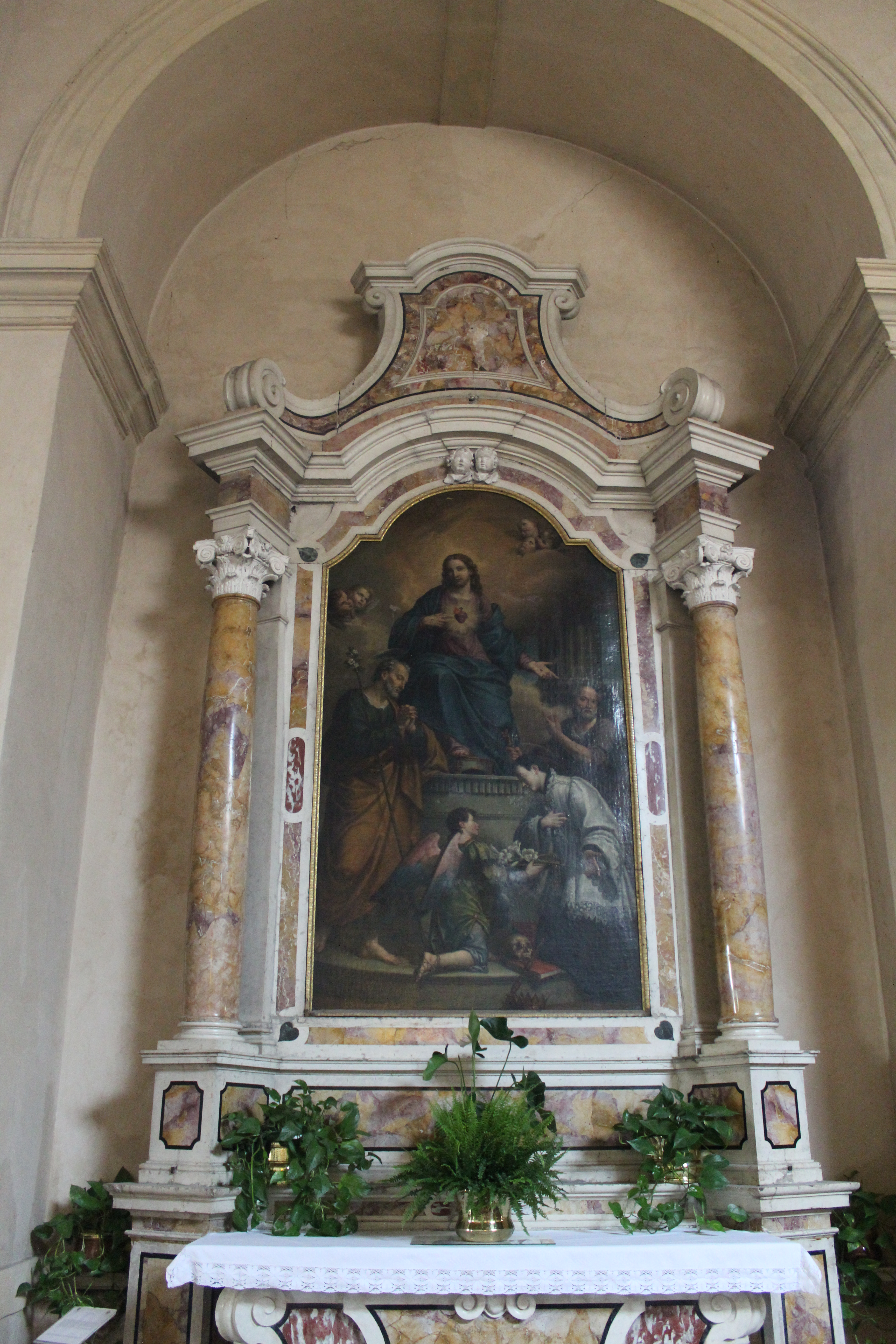 Chiesa della Santissima Trinità in Monte Oliveto a Verona. Tela di Giovanni Caliari: Sacro Cuore di Gesù, San Giuseppe, San Pietro, San Luigi